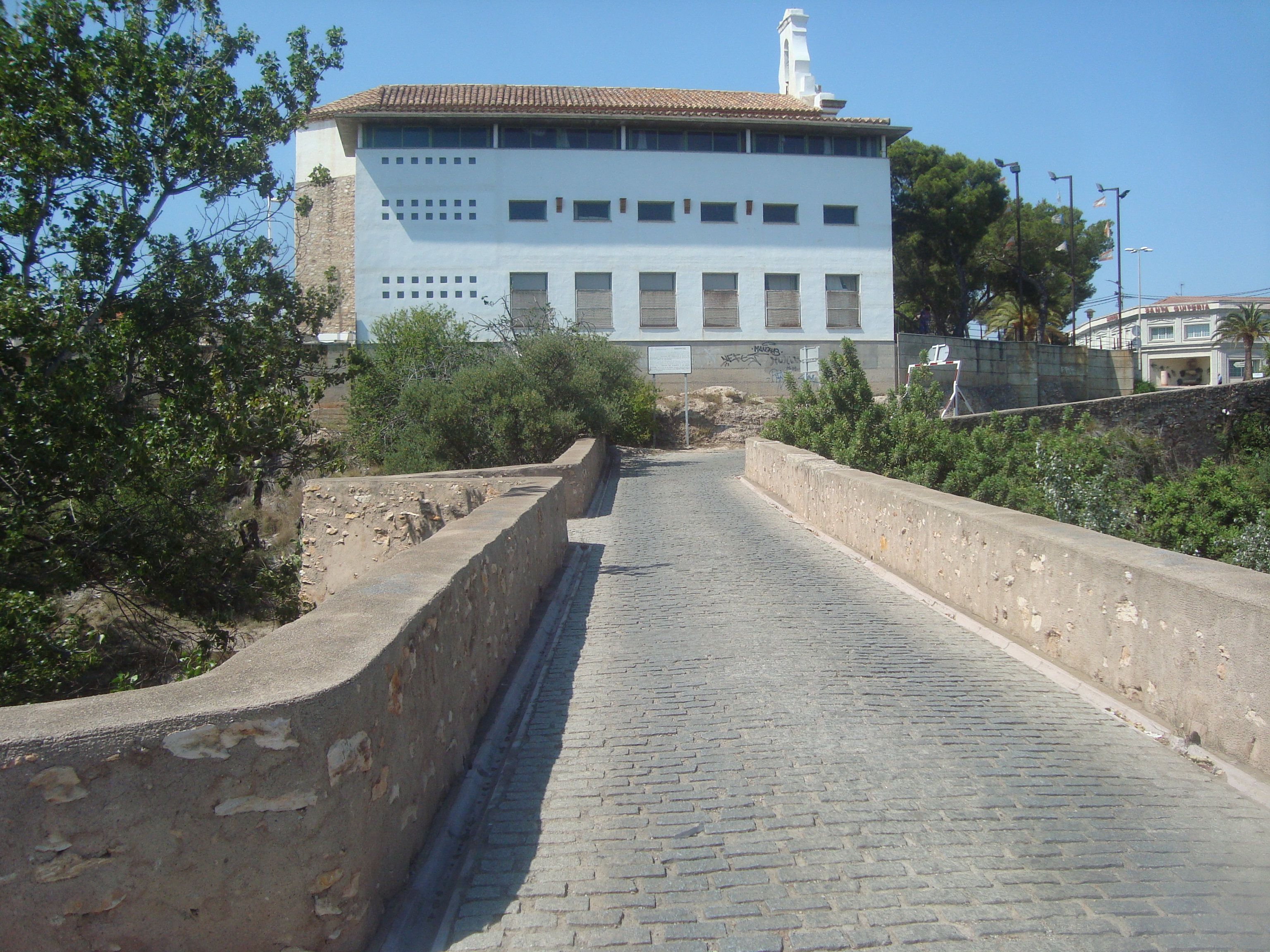 Pont de Santa Quitèria (Almassora i Vila-real)